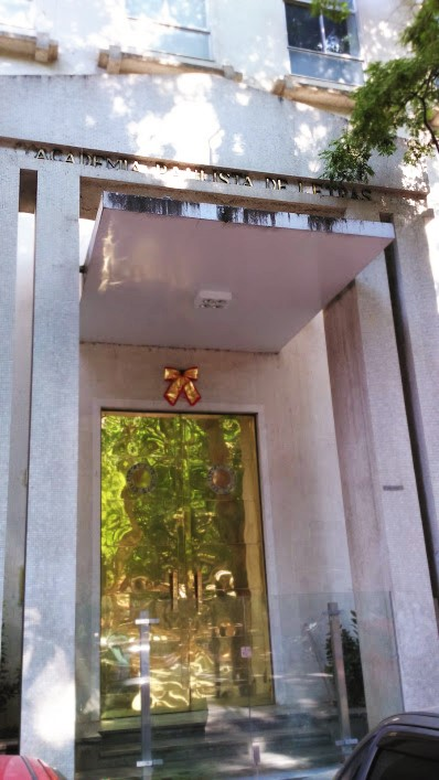 Portal da Academia Paulista de Letras, no Largo do Arouche, em São Paulo